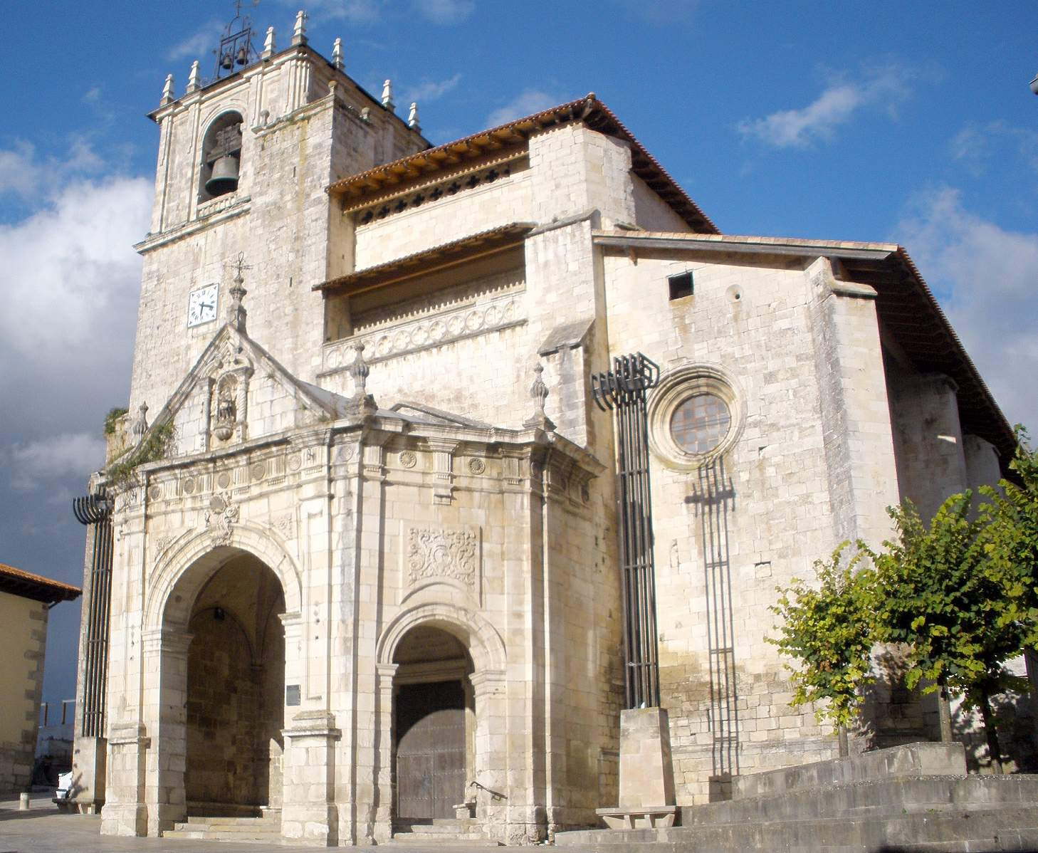 Iglesia de San Juan, Salvatierra-Agurain (Álava, País Vasco, España)